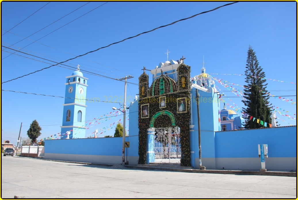 Templo de los Reyes,Tlanechicolpan,San Jeronimo Tecuanipan,Estado de Puebla, México